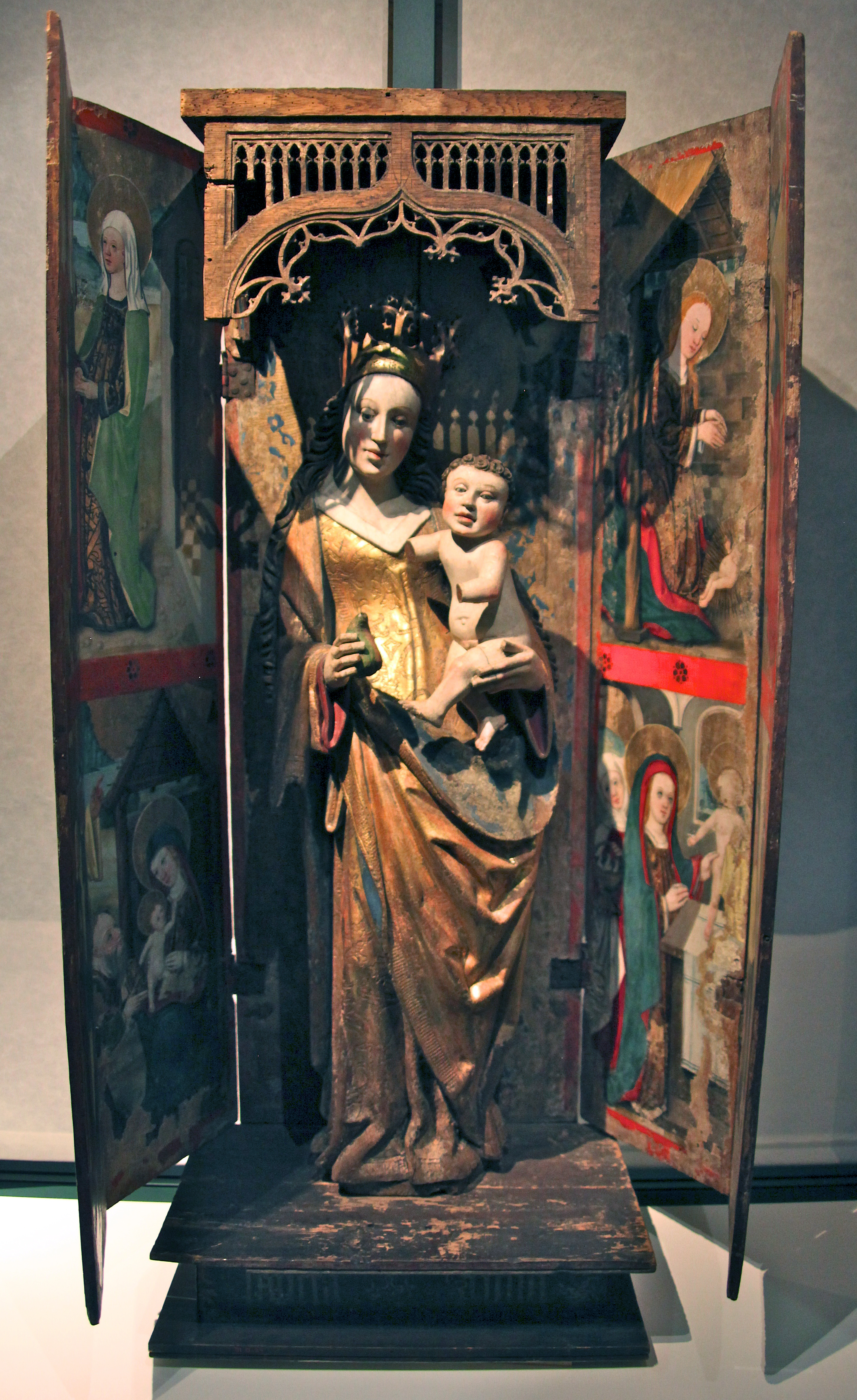 Alterskap fra Brekke kirke